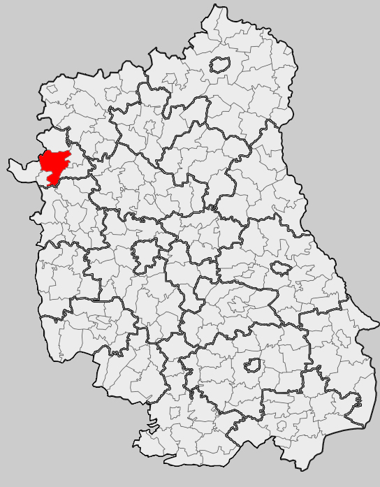 Map of gmina Ryki, Ryki county, Lublin voivodship Mapa gminy Ryki, powiat rycki, województwo lubelskie